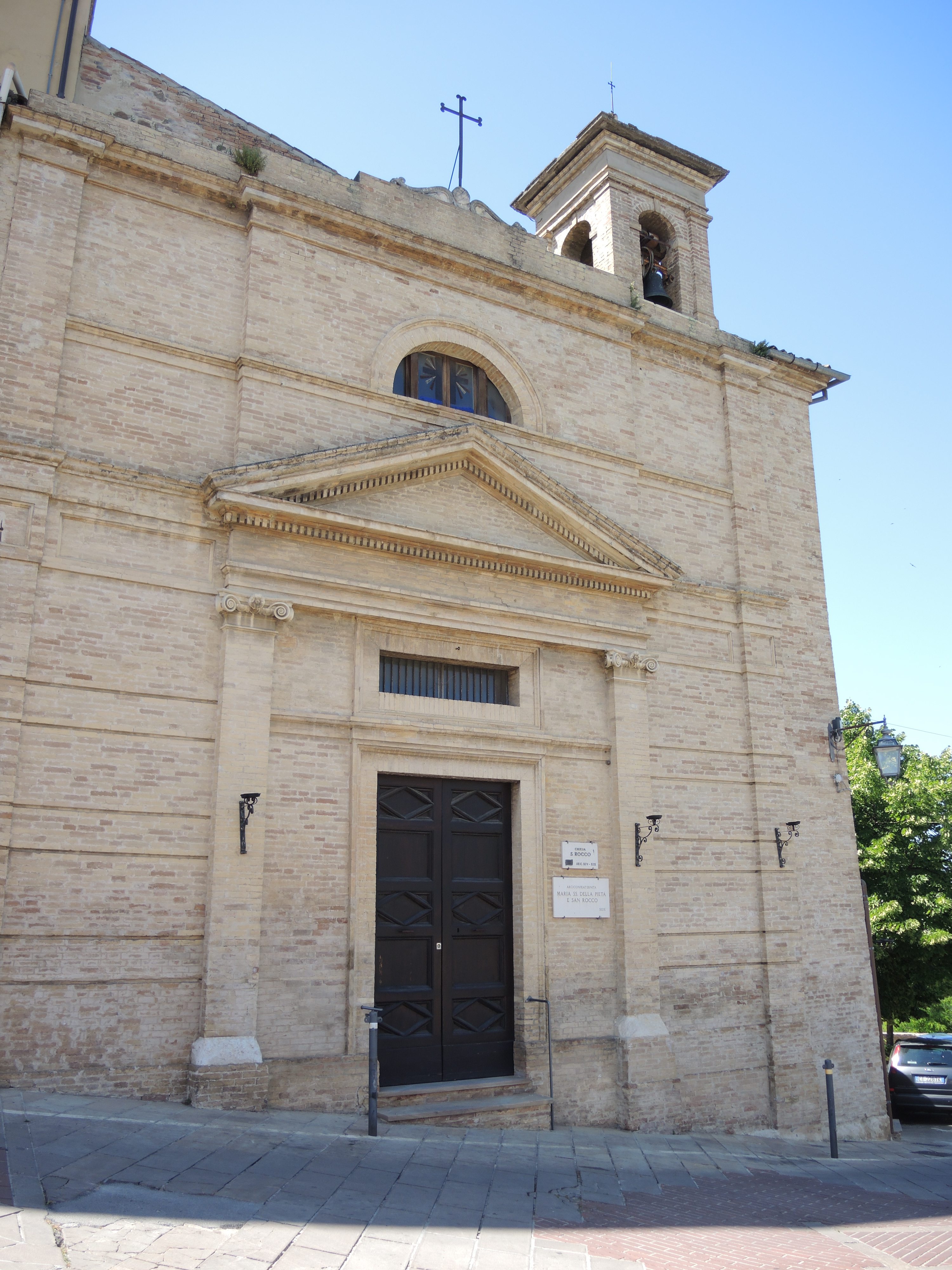 Lanciano - Chiesa di San Rocco